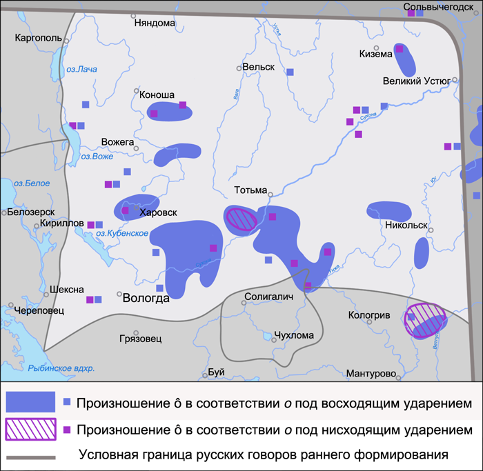 Карта распространения произношения ударного гласного /ô/ ([ô], [у], [оу], [уо]) в соответствии о под восходящим и нисходящим ударением на территории Вологодской группы говоров. Источник: Захарова К. Ф., Орлова В. Г., Сологуб А. И., Строганова Т. Ю. Образование севернорусского наречия и среднерусских говоров / ответственный редактор В. Г. Орлова. — М.: Наука, 1970. — С. 256 (карта 68).